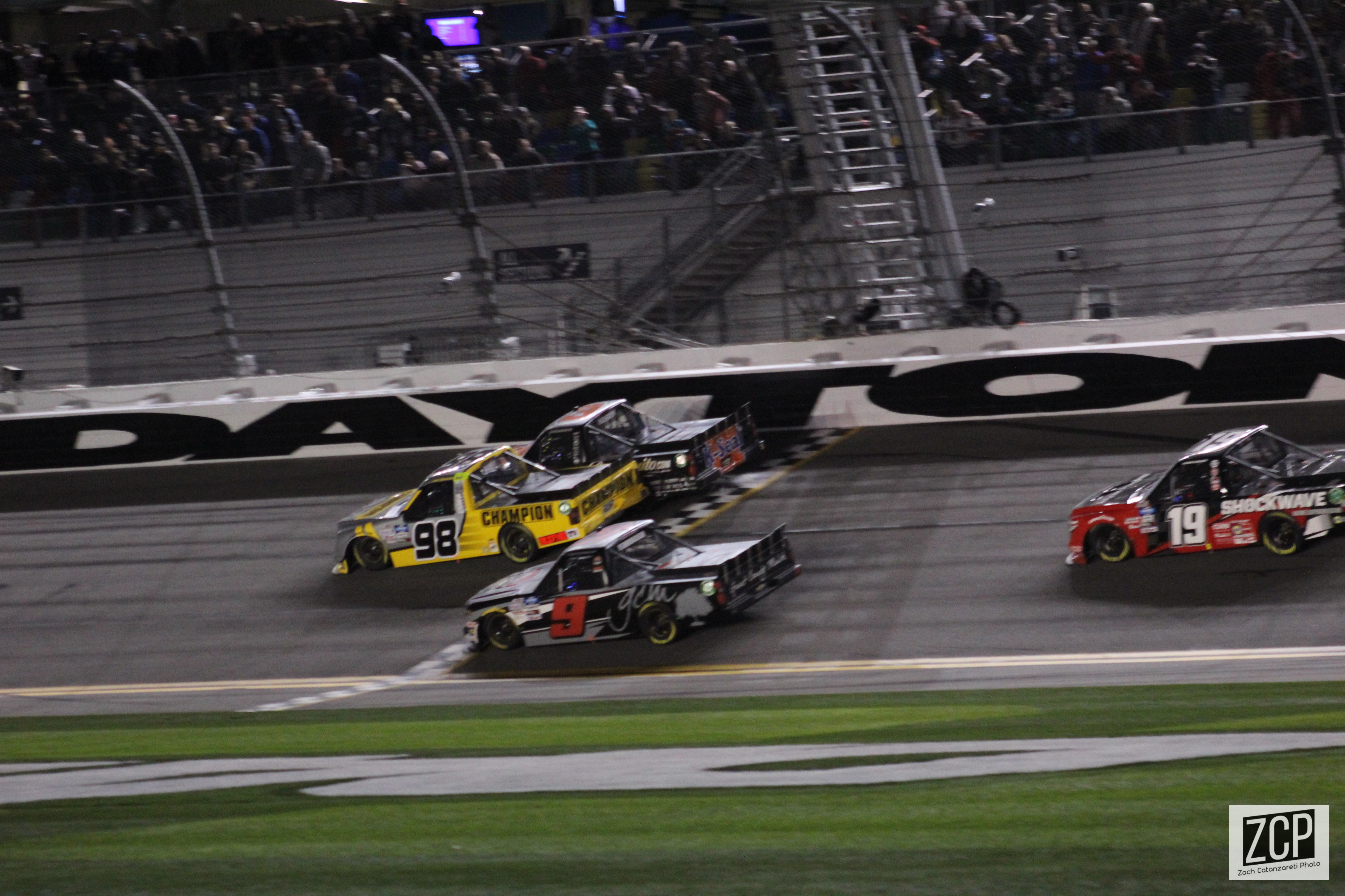 Daytona Speekweeks, 2020